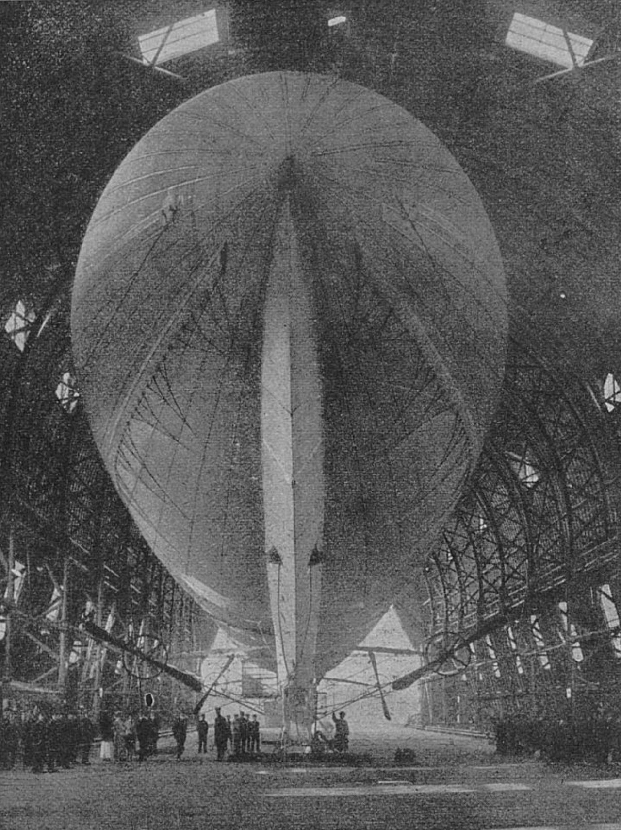 Das halbstarre Luftschiff "Veeh" besaß einen Kiel aus Stahlgitterrahmen und war unter feldmäßigen Bedingungen zerlegbar. Nach dem Absturz seines erste​n Schiffes "Veeh I." baute der Ingenieur Albert Paul Veeh noch einen zweiten lenkbaren Ballon. Die "Veeh" war in Düsseldorf stationiert.